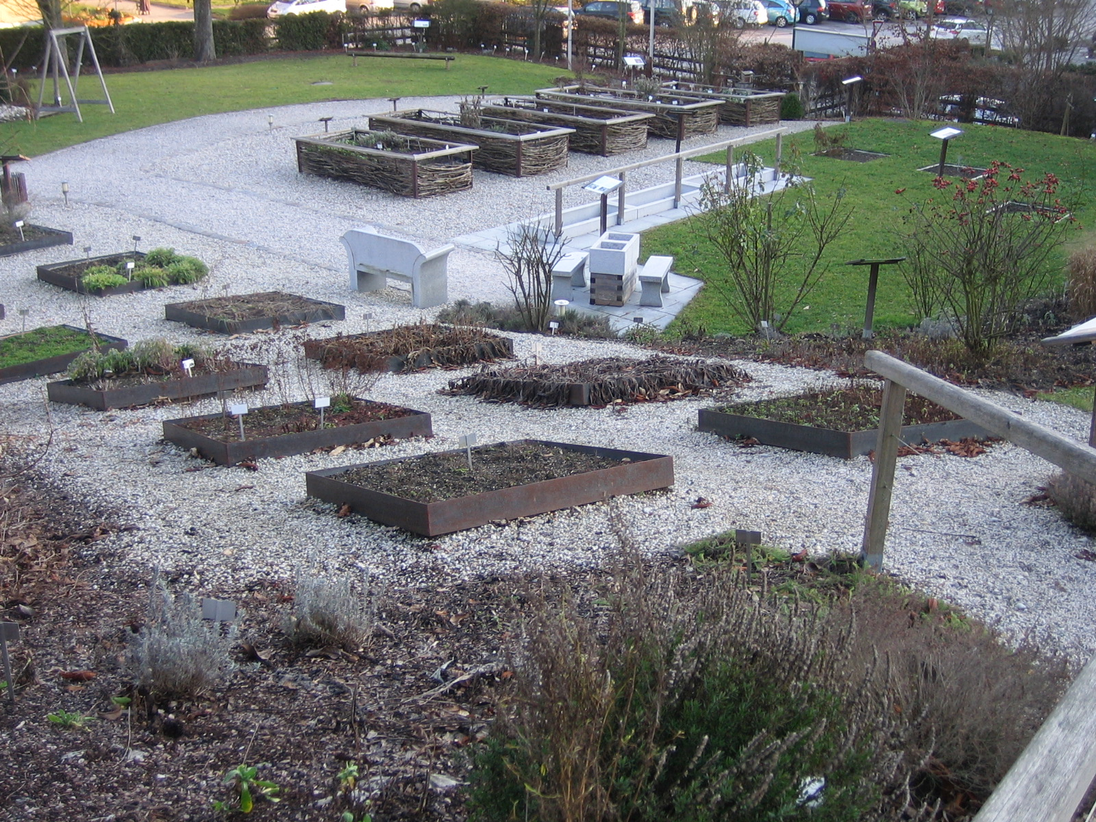 Kräutergarten Bad Mühllacken, Blick vom Hildegardweg herunter